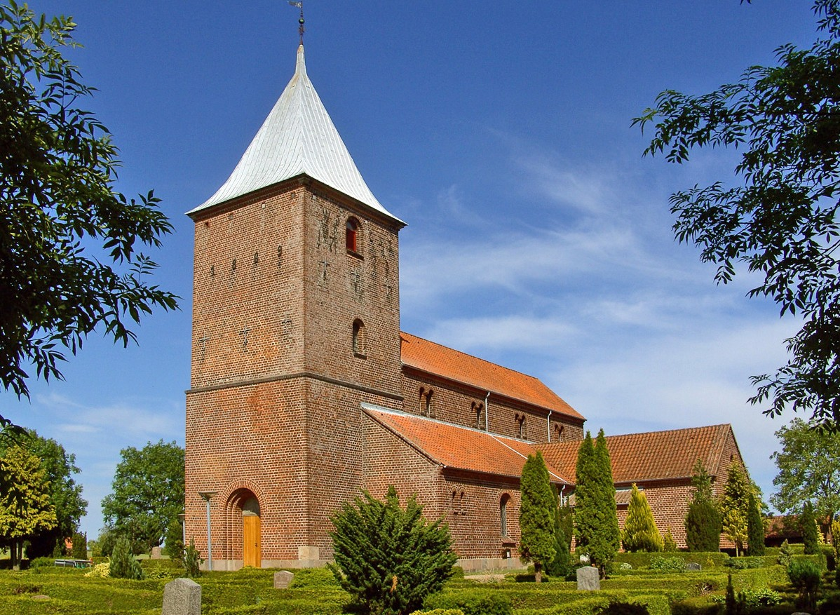 fra sydvest